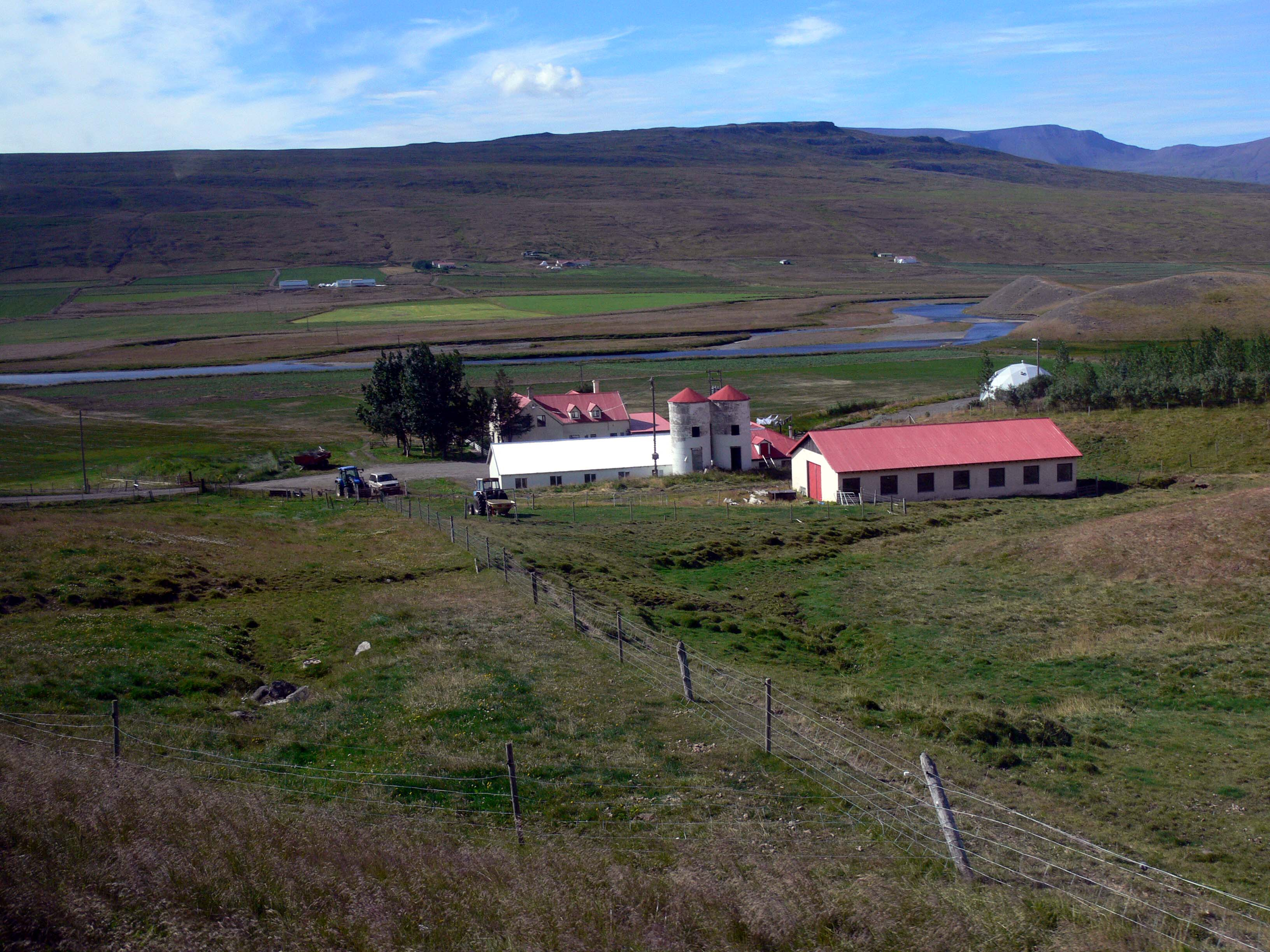 Vatnsdalur. Hier soll nach der Vatnsdæla saga der Landnámsmann Ingimundur gesiedelt haben.